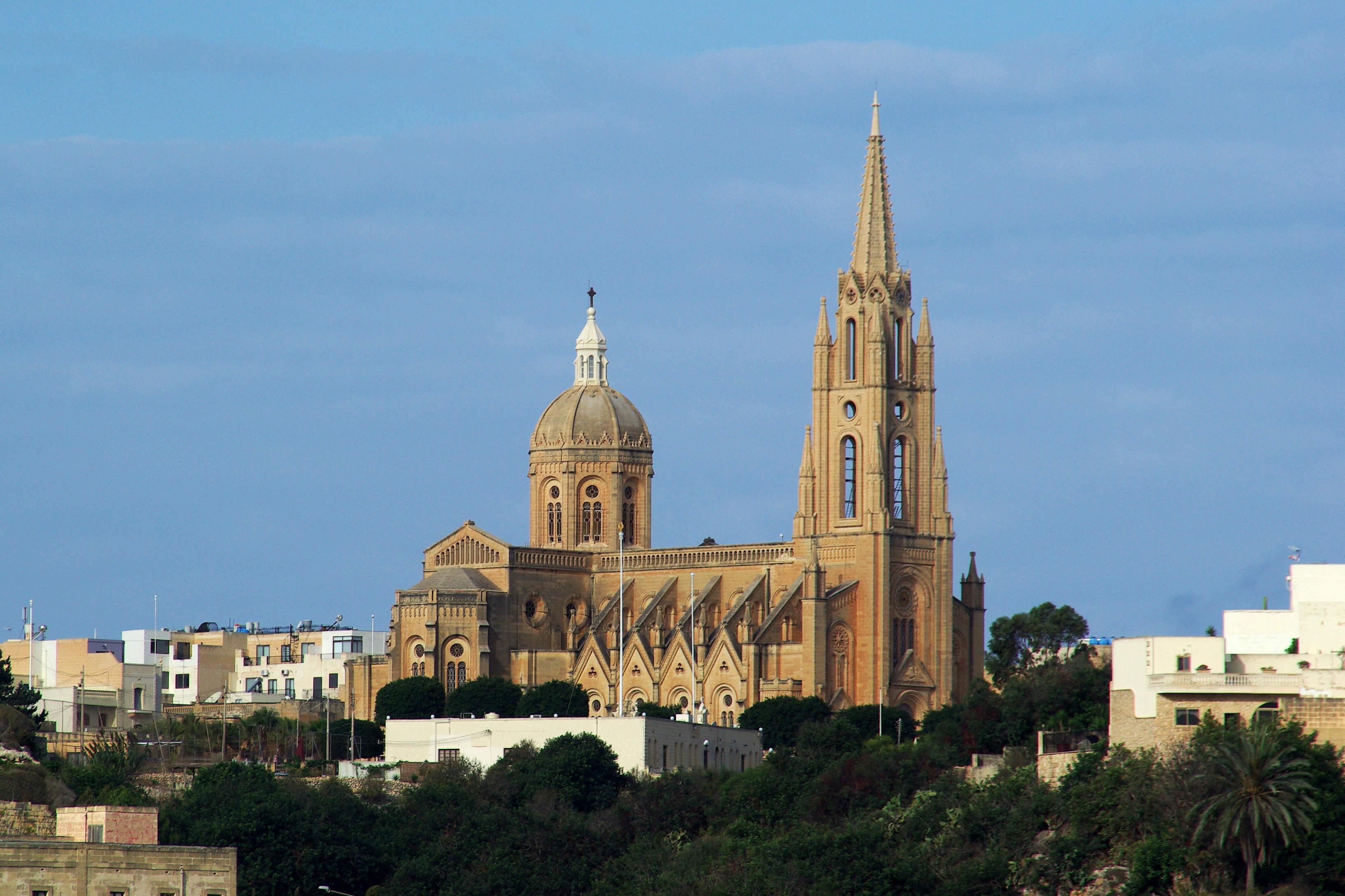 Malta, Gozo, Mgarr